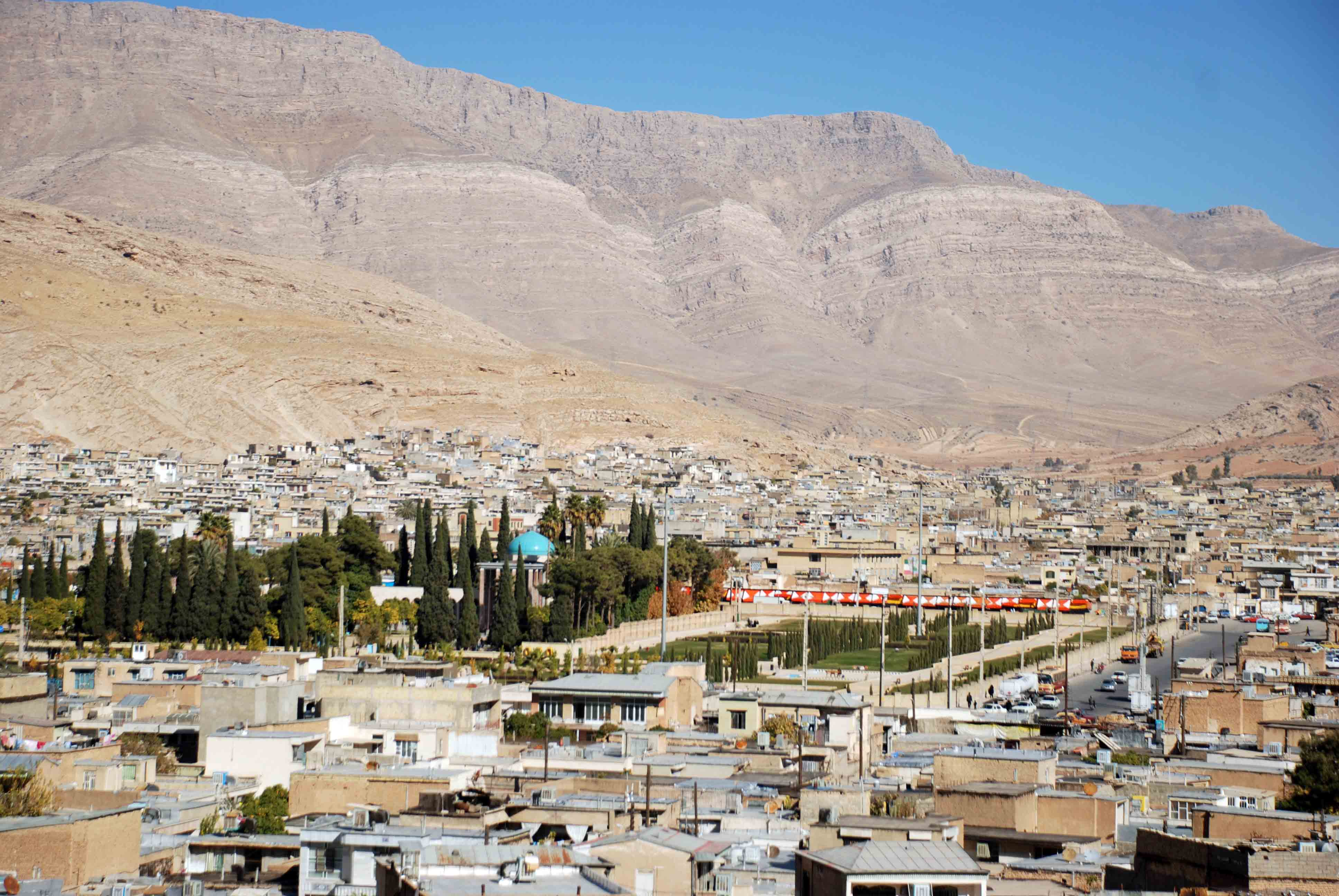 کوه بمو و آرامگاه سعدی در یک نما